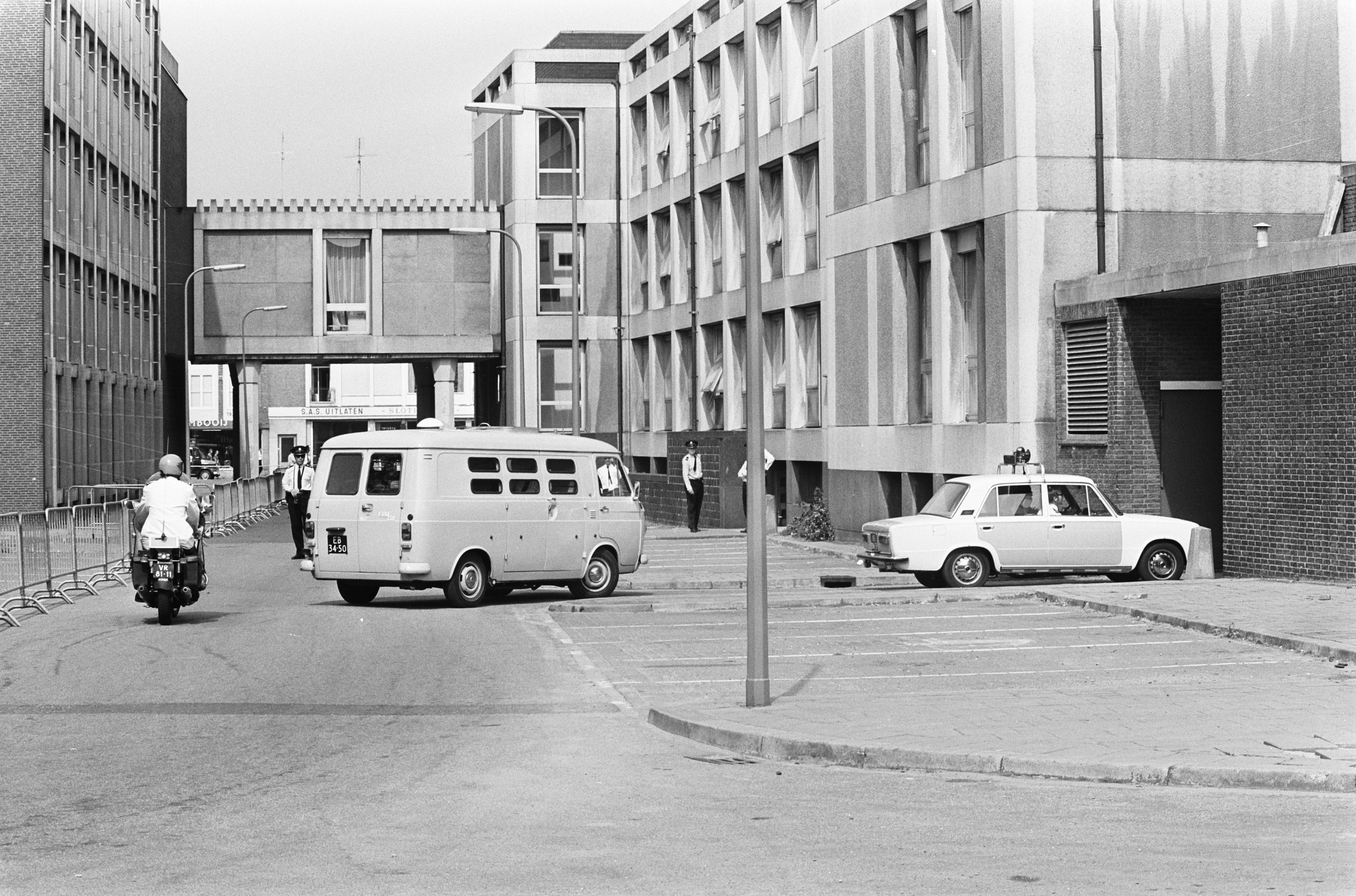 Collectie / Archief : Fotocollectie Anefo Reportage / Serie : Rechtszaak in Arnhem tegen Zuid-Molukkers vanwege de voorgenomen gijzeling van koningin Juliana Beschrijving : Verdachten komen in een politiebusje aan bij het Paleis van Justitie Datum : 10 juni 1975 Locatie : Arnhem, Gelderland Trefwoorden : auto's, gerechtsgebouwen, politieagenten Fotograaf : Fotograaf Onbekend / Anefo Auteursrechthebbende : Nationaal Archief Materiaalsoort : Negatief (zwart/wit) Nummer archiefinventaris : bekijk toegang 2.24.01.05 Bestanddeelnummer : 927-9801